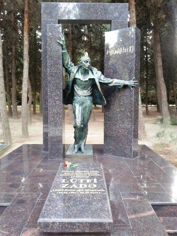 Lütfi Zadənin məzarı